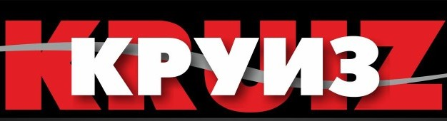 Логотип группы «Круиз»